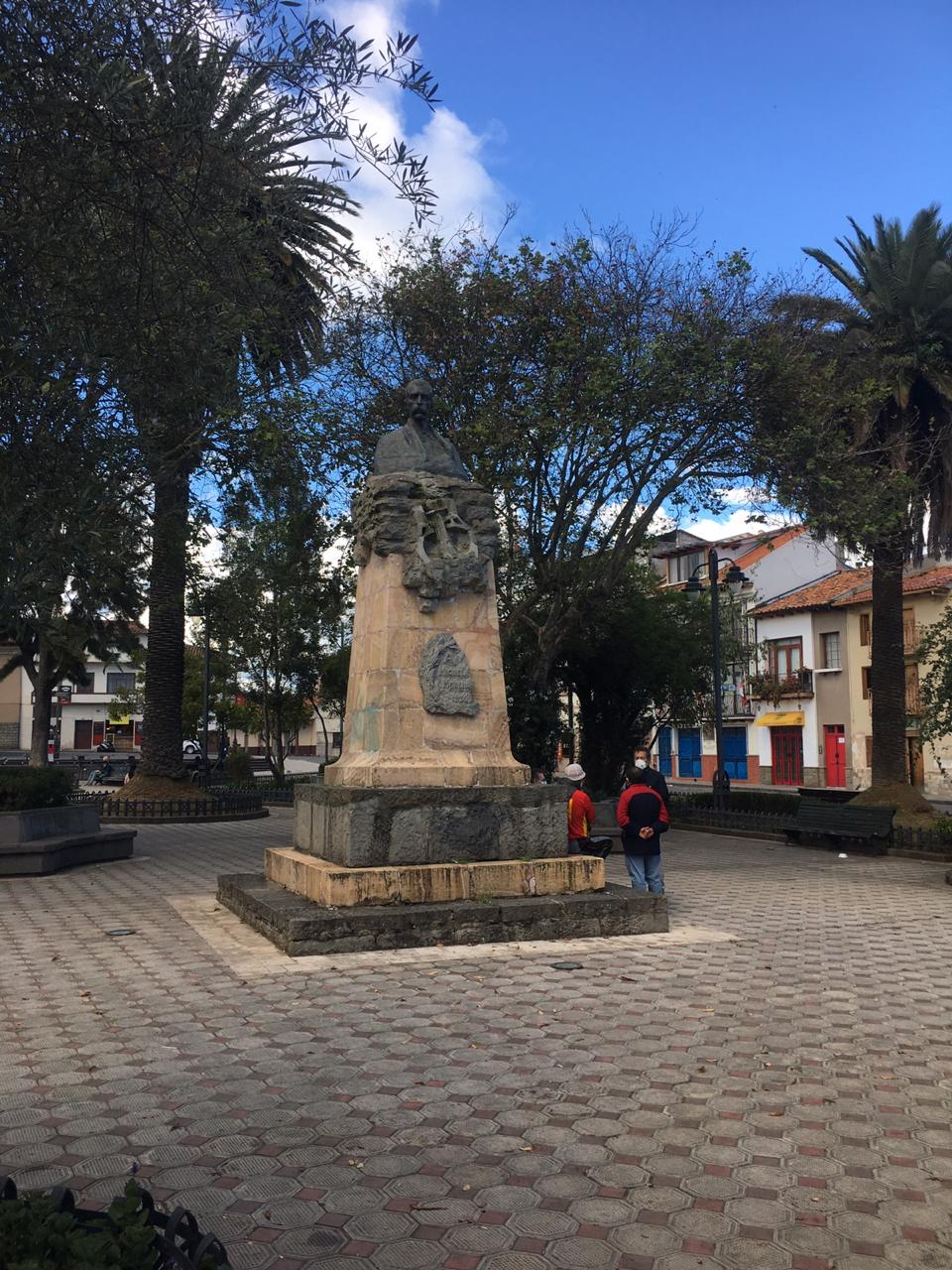 monumento ubicado en el parque San Sebastian a Miguel Moreno (escritor) en Cuenca Ecuador.